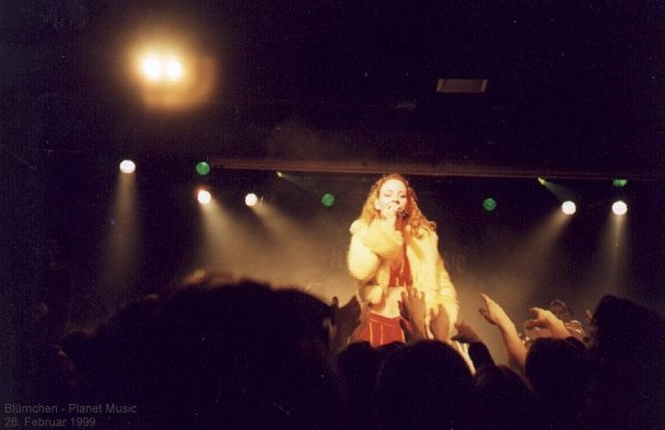 Blümchen, Konzert im Planet Music, Wien